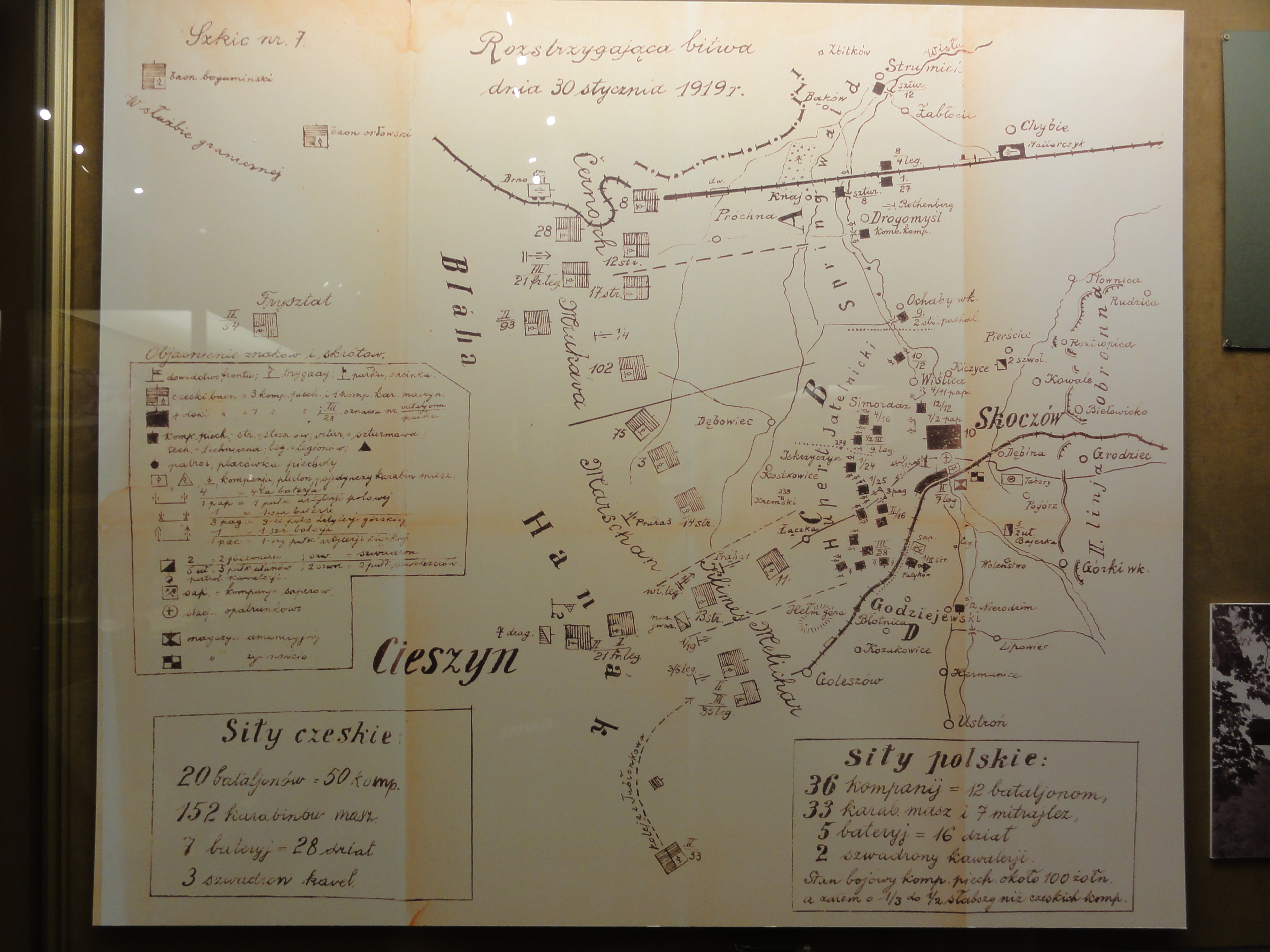 Muzeum ŚC - Mapa bitwy skoczowskiej